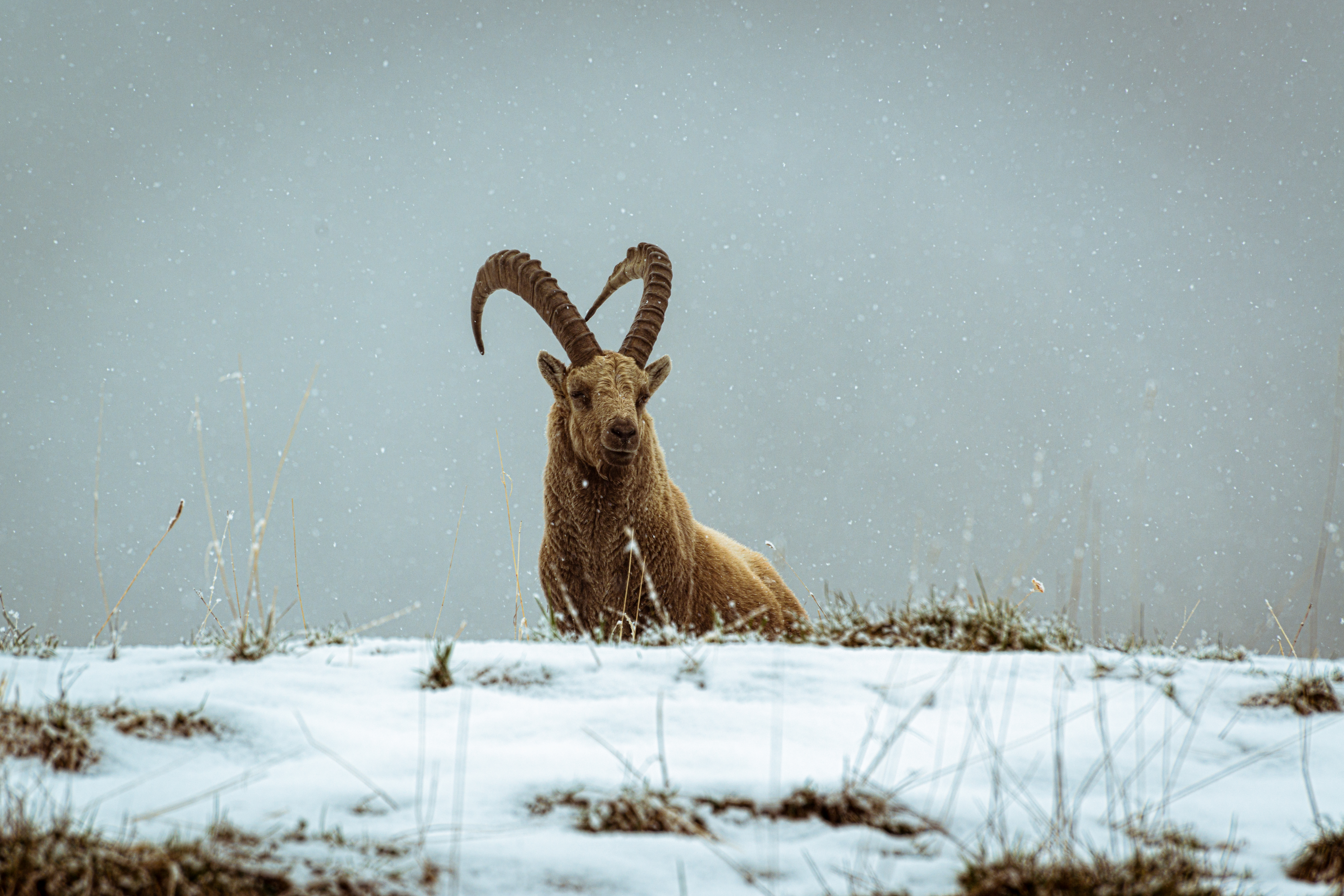 Photo prise en mai 2017 lors d'une randonnée depuis le torrent du Rif